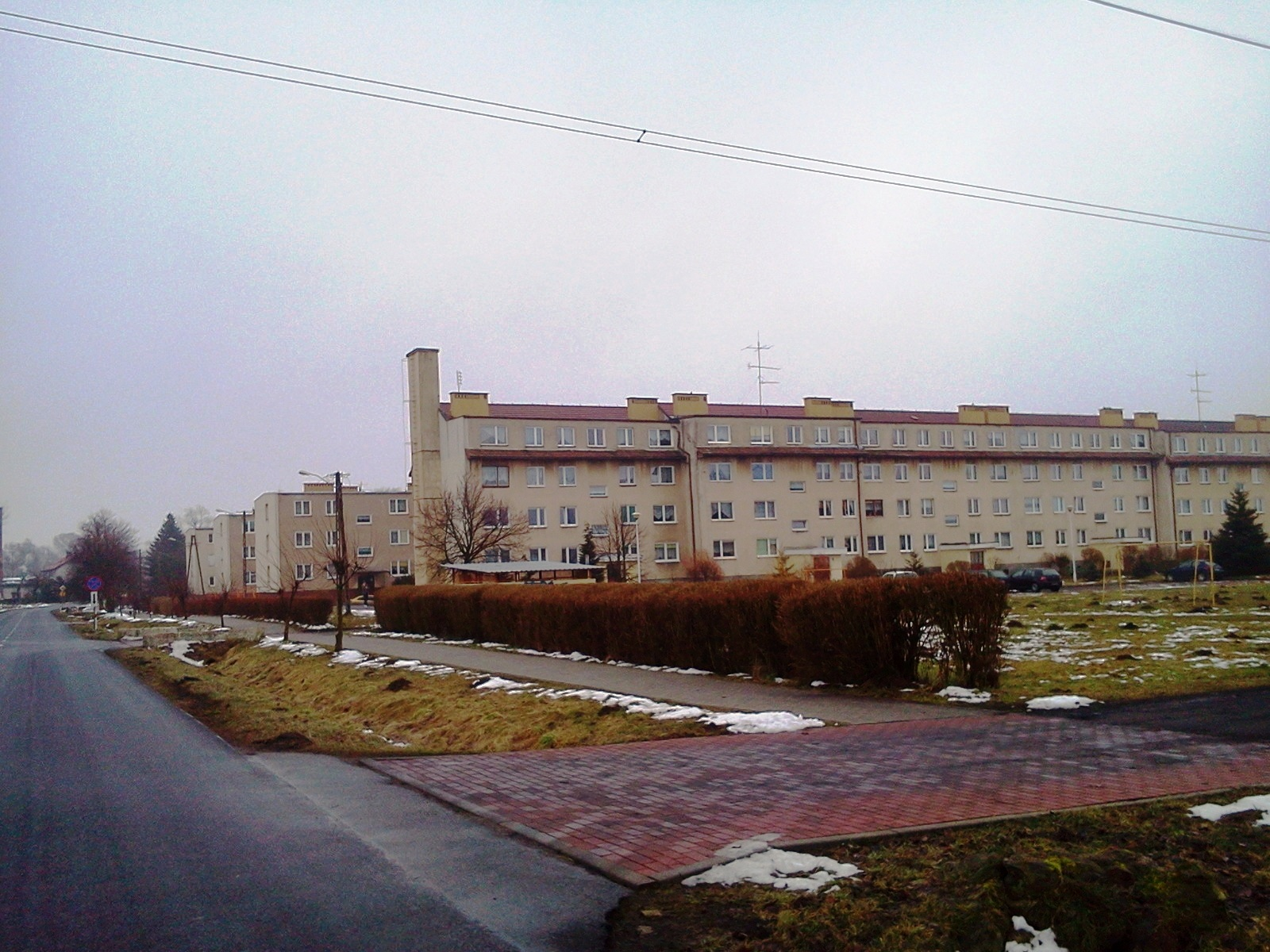 Osiedle w Radowie Małym